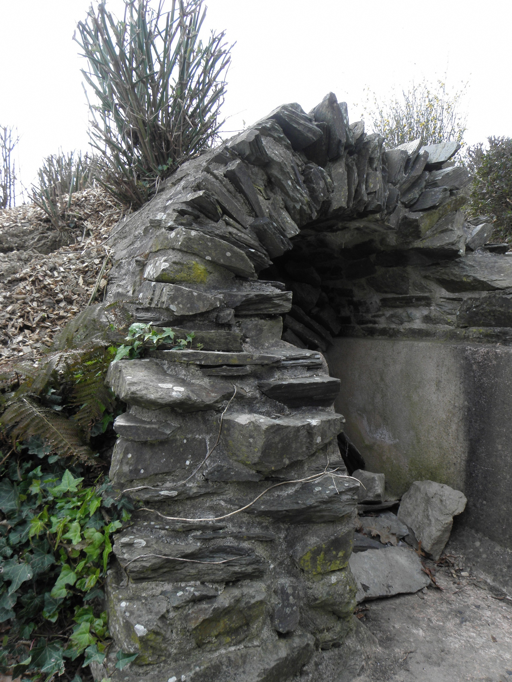 Aqueduc romain de Carhaix-Plouguer (29).